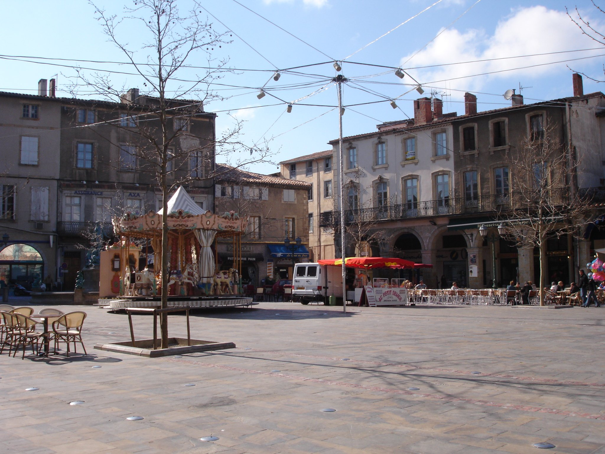 Place de la République à Limoux (Aude, France).